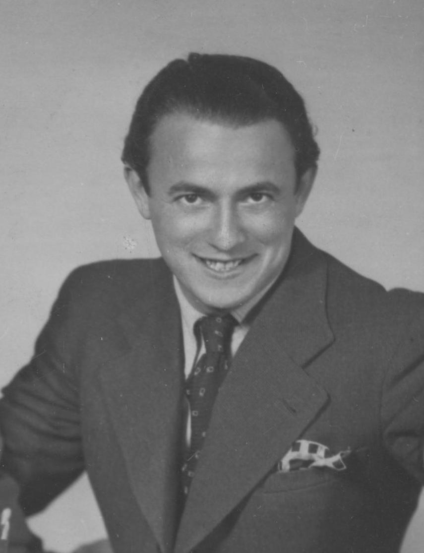 Pianista Bolesław Kon